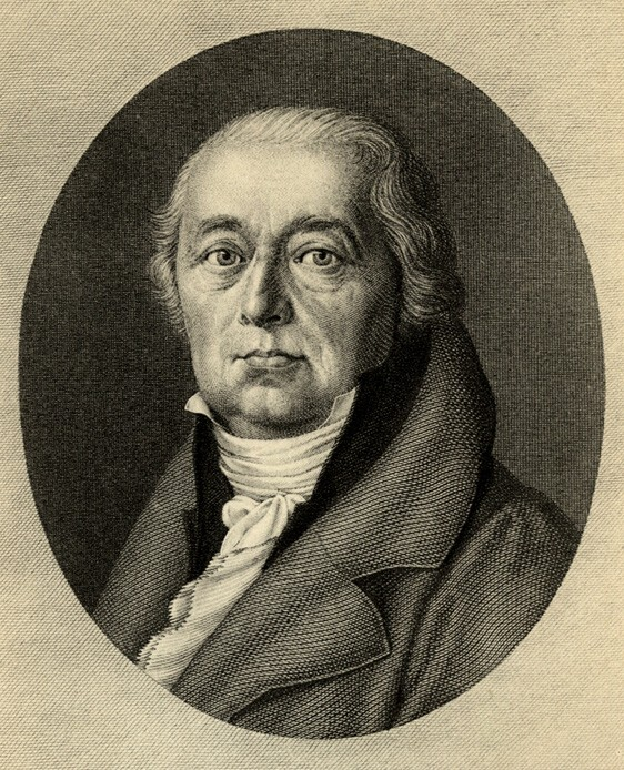 Portrait des Philologen Johann Jakob Hottinger (1750-1819).